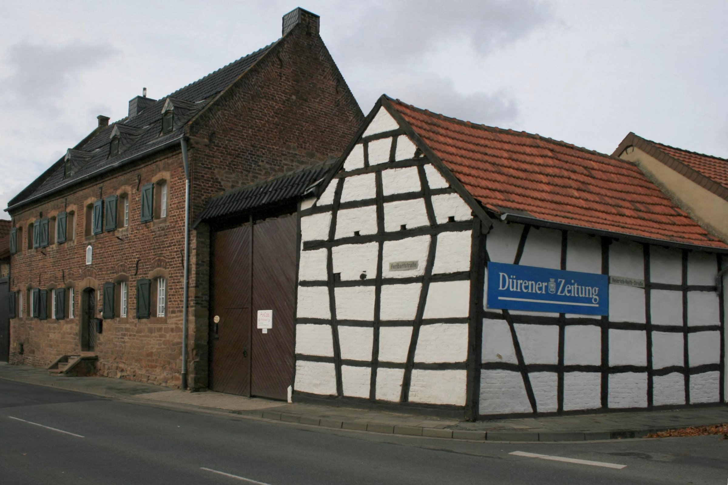 Der Bauernhof Heribertstr. 2 in Nörvenich-Eschweiler ü.F.